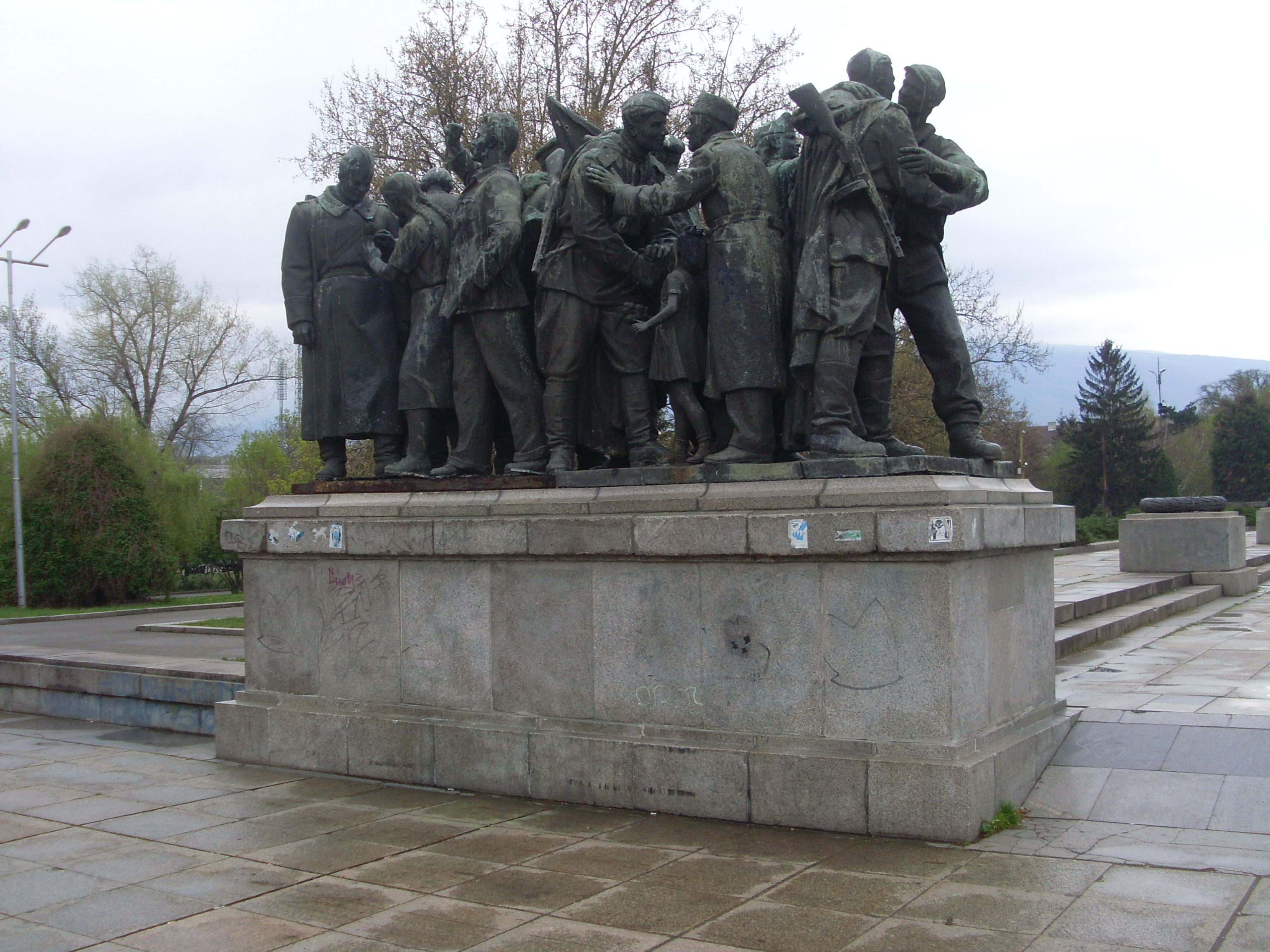 Monumento al ejercito rojo Sofia, Bulgaria, lateral izquierdo, abril de 2011